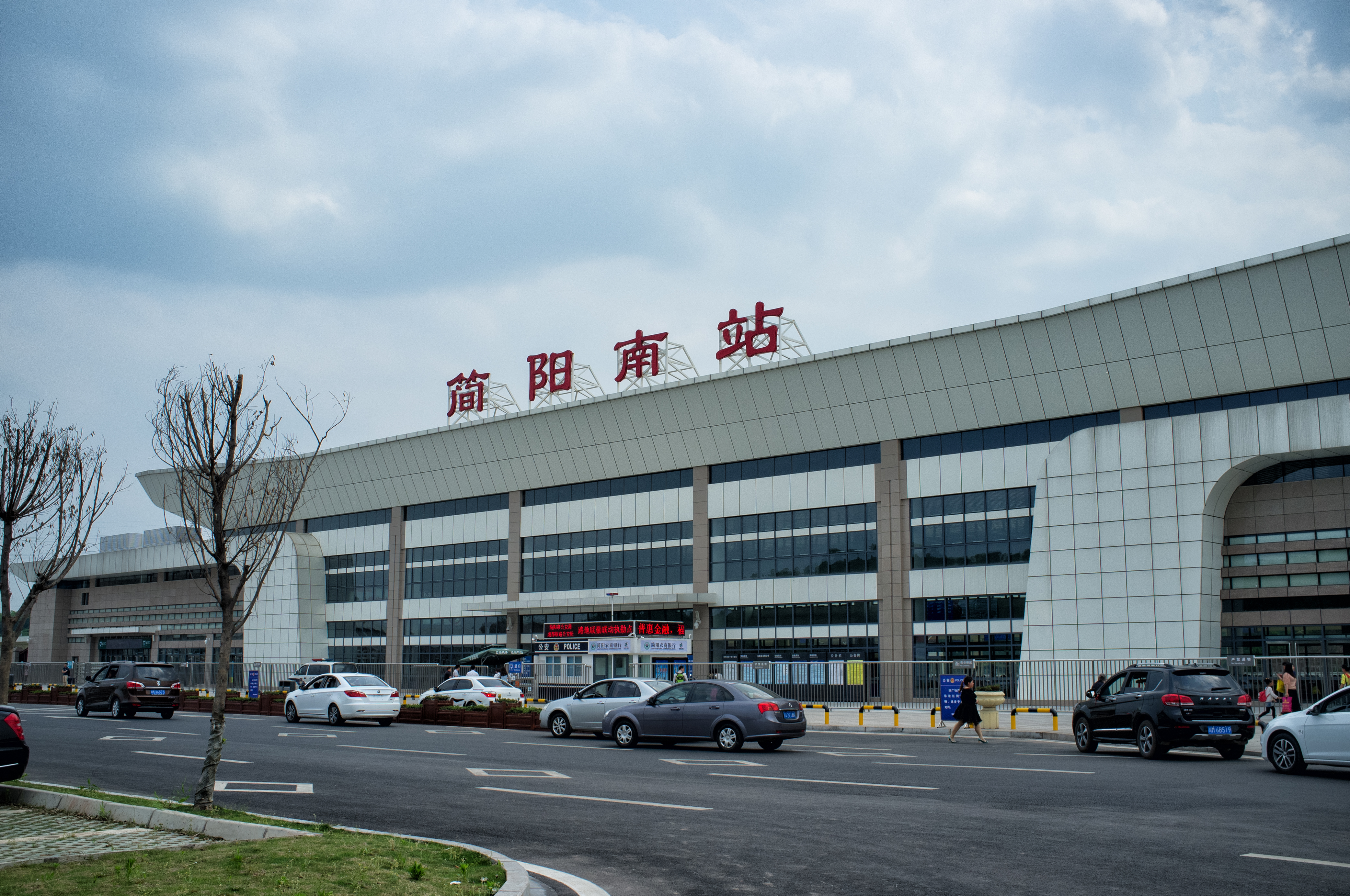 中文（中国大陆）: 国铁成渝客运专线简阳南站